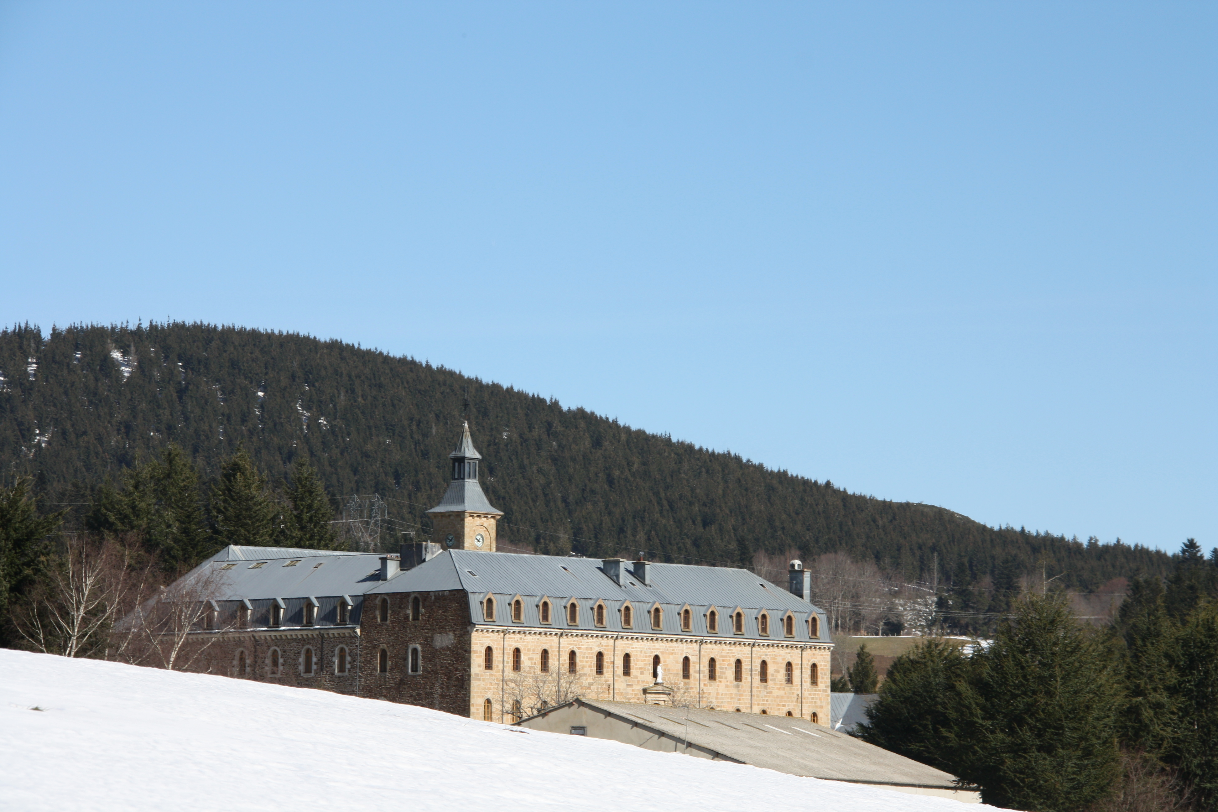 L'Abbaye Notre-Dame-des-Neiges à Saint-Laurent-les-Bains (Ardèche).